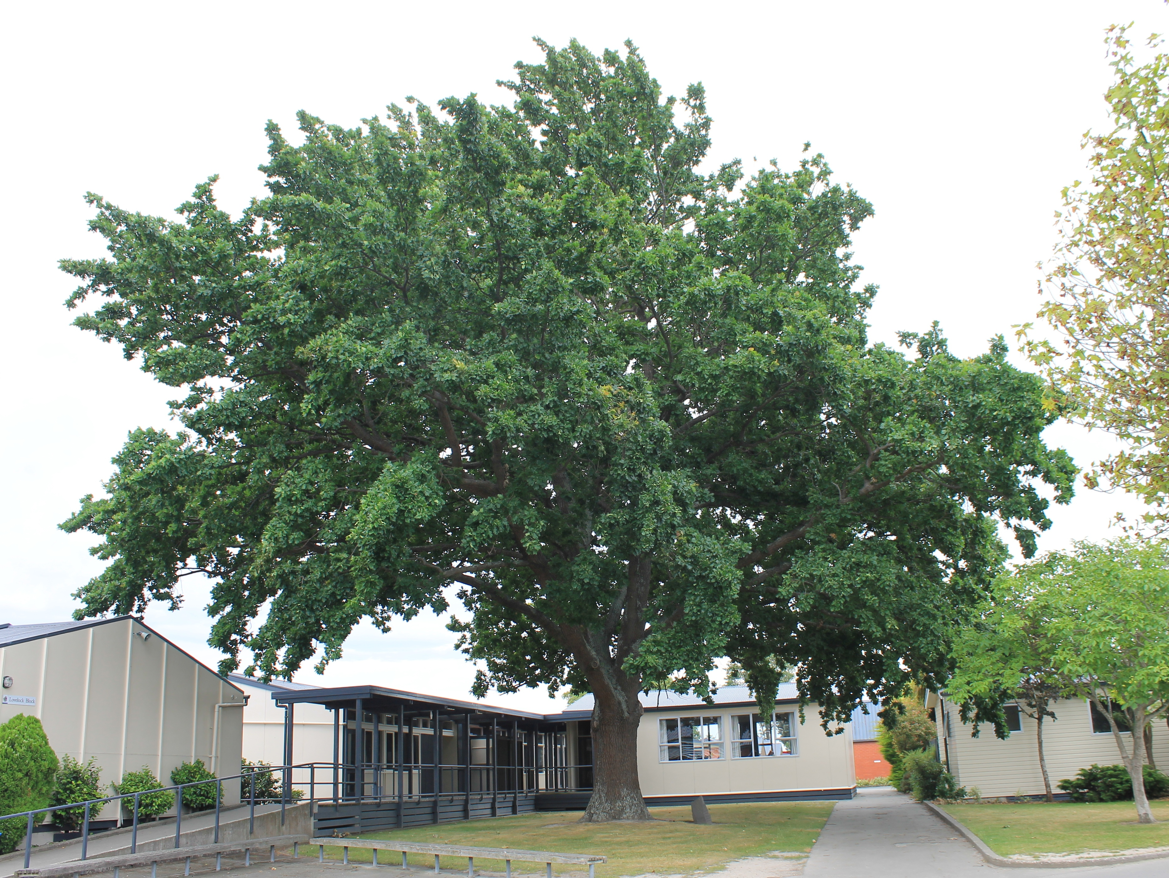 Olympia-Eiche des Olympiasiegers Jack Lovelock, Timaru Boys High School, Timaru NZ